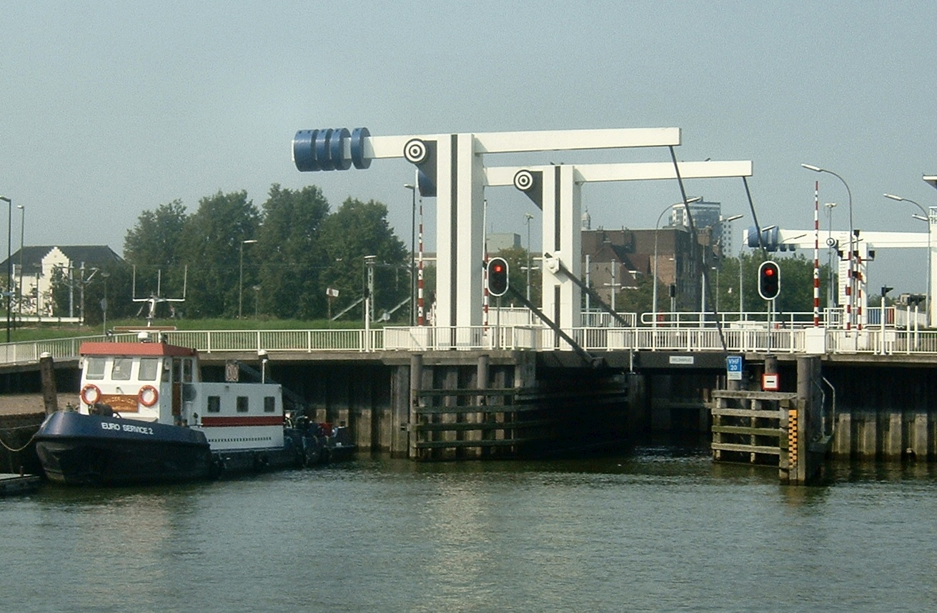 Ophaalbruggen over Delflandsluis in Vlaardingen (foto 2004)